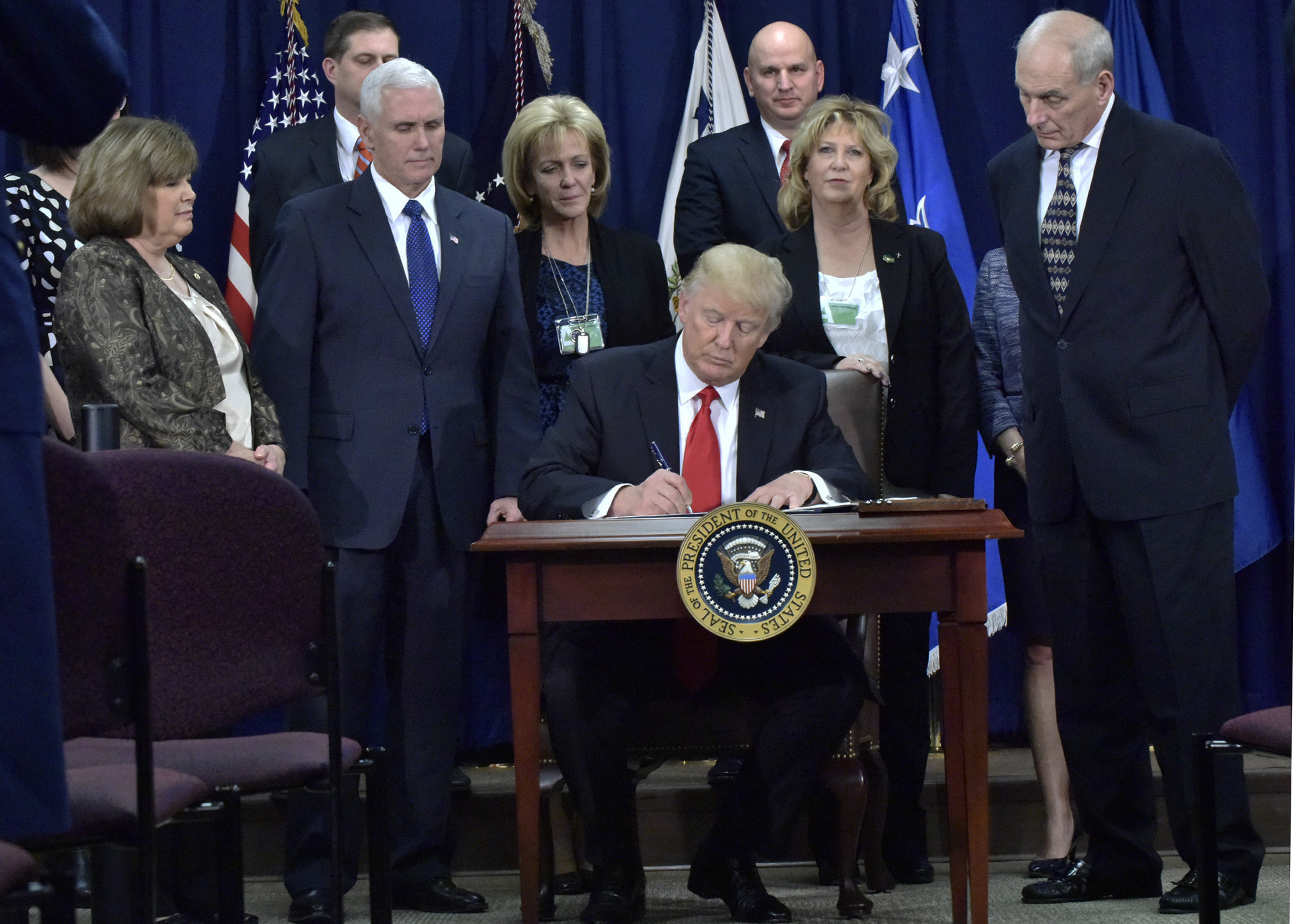 POTUS visits DHS